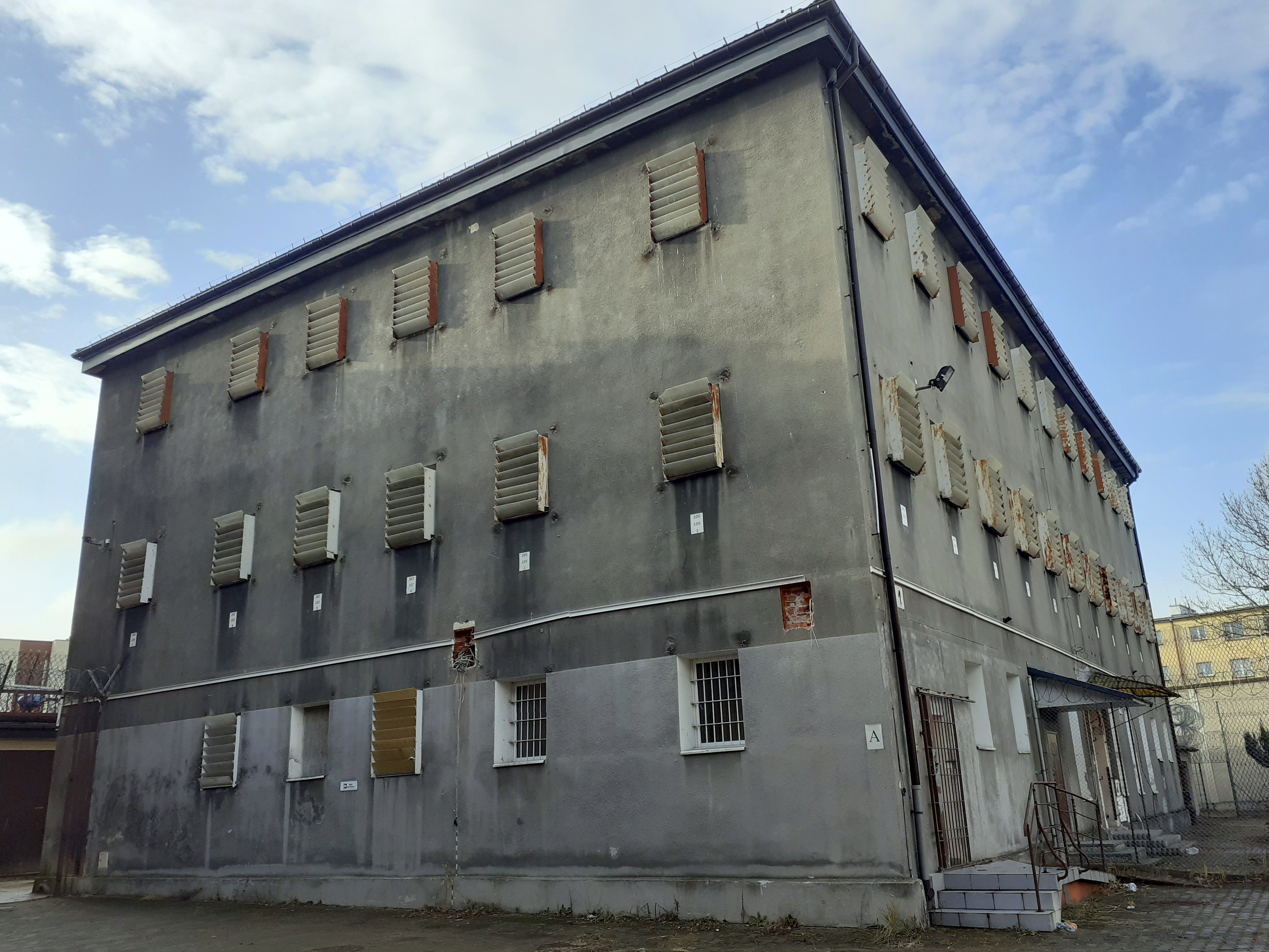 Dziedziniec Aresztu Śledczego Sanok (grudzień 2019).